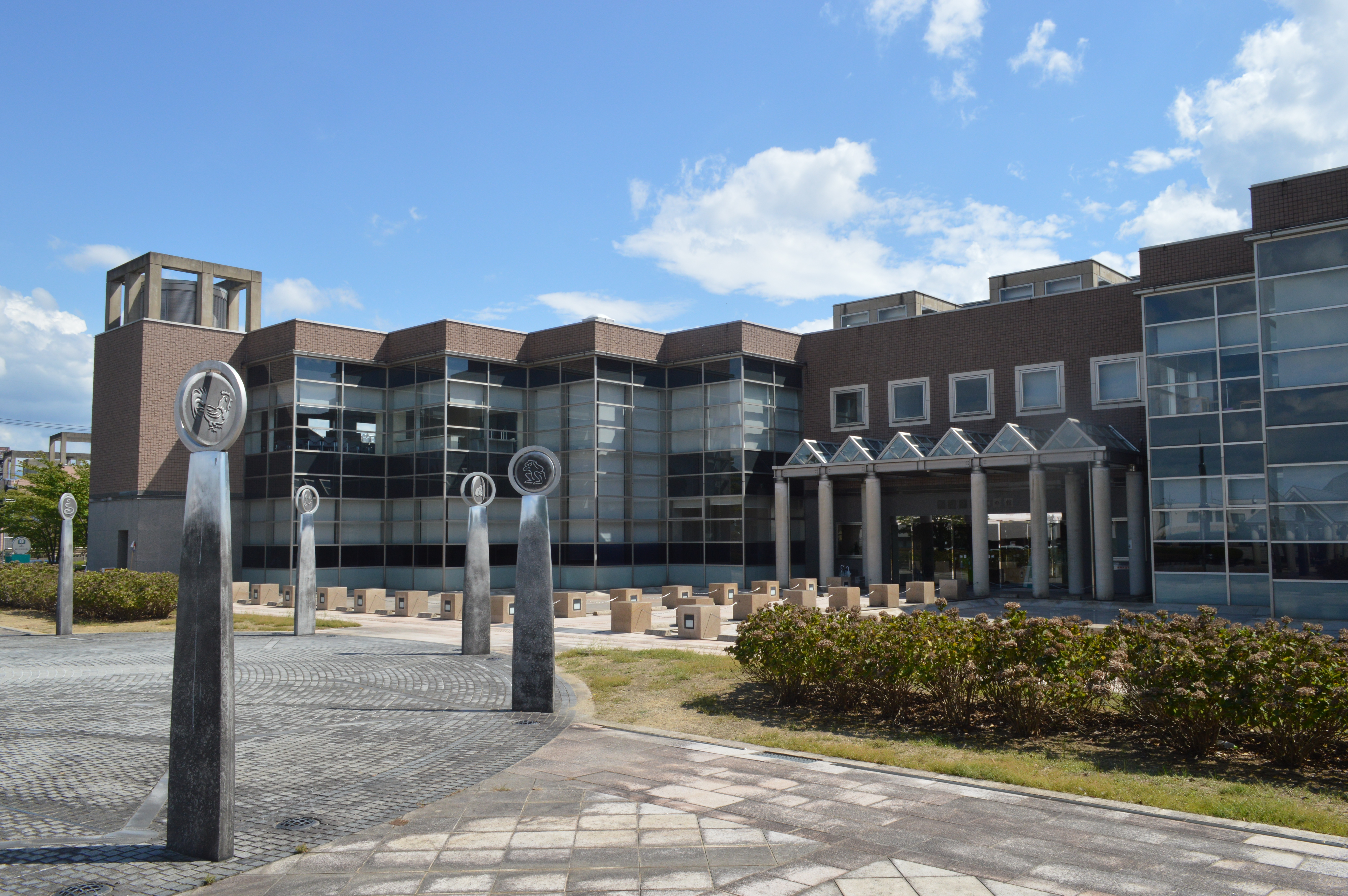 鯖江市文化の館。鯖江市図書館など。